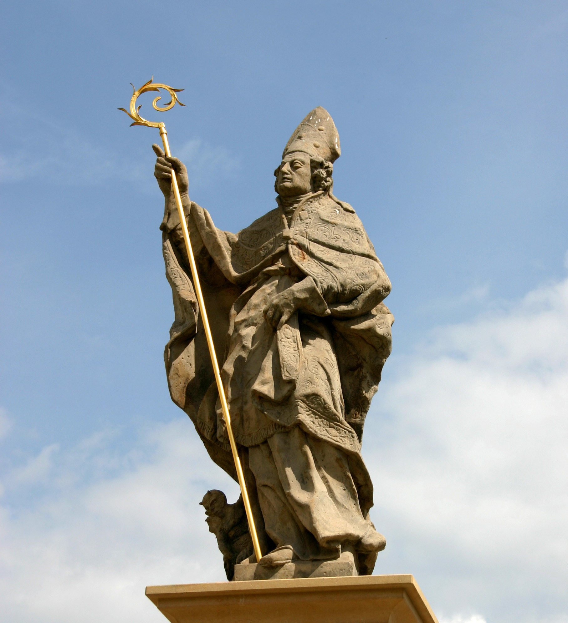 Socha sv. Prokopa v Mostě